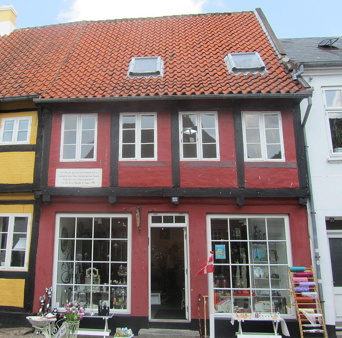 Emil Christian Hansen (8. maj 1842 i Ribe - 27. august 1909 i Hornbæk)s fødested